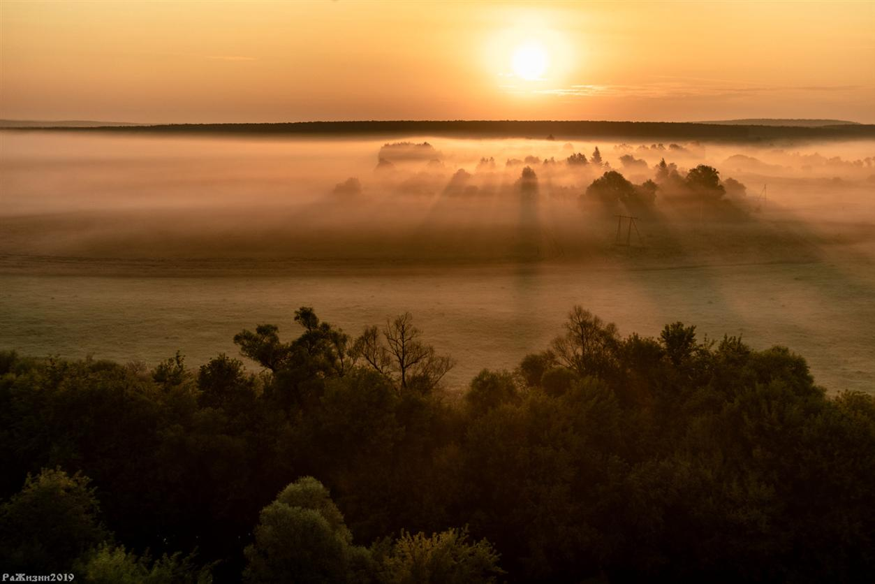 деревня Марс в тумане. Вид с фестивальной поляны Междуречья на высоком берегу